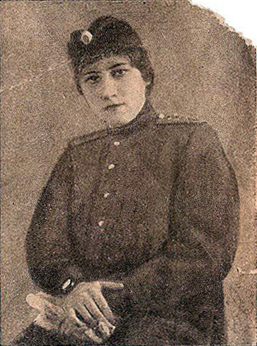 Шаховская Евгения Михайловна. В действующей армии, 1915 год